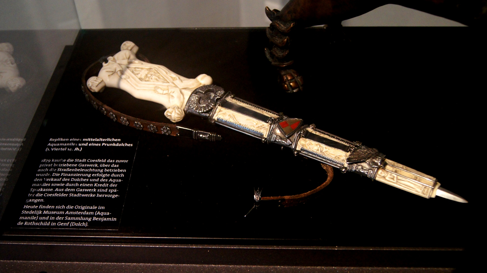 Der sog. Kamphues-Dolch ist ein kunsthistorisch bedeutender, gotischer Dolch mit Elfenbeingriff aus dem frühen 14. Jahrhundert. Er trägt das Wappen der Herren von Graes, die nahe der münsterländischen Stadt Ahaus residierten. Es wird vermutet, dass diese oder die ihnen nahe stehenden Edelherren von Ahaus den Dolch in Auftrag gegeben haben. Ob und wie weit er tatsächlich mit Kort Kamphues in Verbindung gebracht werden kann, ist unbekannt; in der Aufstellung der bei Kamphues beschlagnahmten Gegenstände findet sich der nach ihm benannte Dolch auf jeden Fall nicht. Das Stadtarchiv Coesfeld führt den Dolch zumindest seit 1717. Im Jahr 1879 veräußerte die Stadt den Dolch zusammen mit einem bronzenen Aquamanile für 13.000 Mark an die Gebrüder Bourgeois (Köln) und verwendete den Erlös für die städtische Gasanstalt, einen Vorläufer der Stadtwerke Coesfeld. Nach fast 130 Jahren, in denen über seinen Aufenthaltsort nichts bekannt war, spürte ihn Rudy von Graes im Jahr 2007 in der Sammlung des Baron de Rothschild in Schloss Pregny am Genfer See auf. Eine Replik befindet sich heute wieder im Besitz der Stadt Coesfeld. Sie ist im Stadtmuseum im Walkenbrückentor ausgestellt und zeigt den Dolch, wie er zum Zeitpunkt seiner Veräußerung ausgesehen hat.